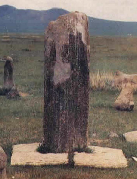 küli çor yazıtı resmi moğolistan